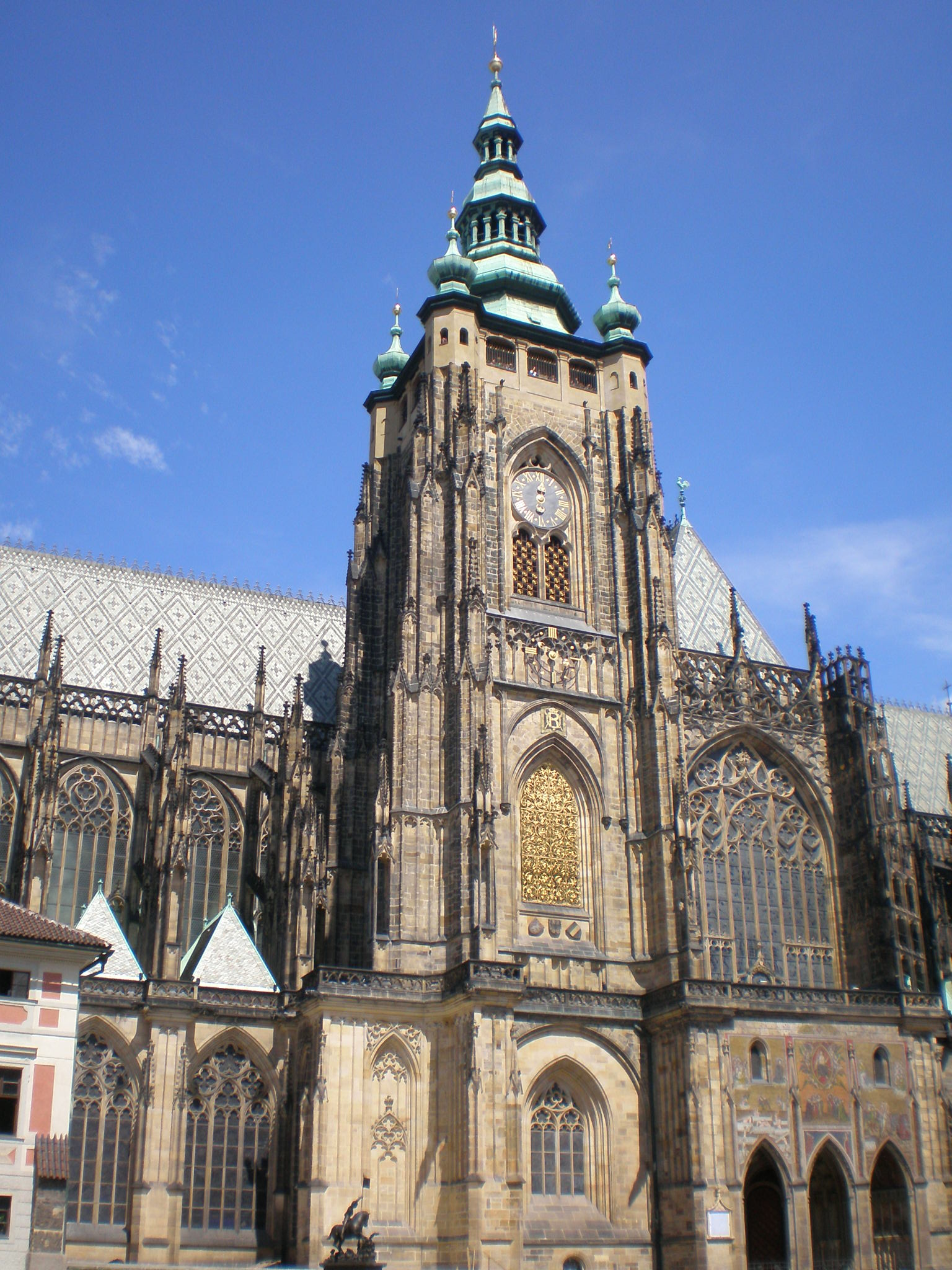 Pohled z jižní strany na hlavní věž a Zlatou bránu svatovítské katedrály na Pražském hradě.